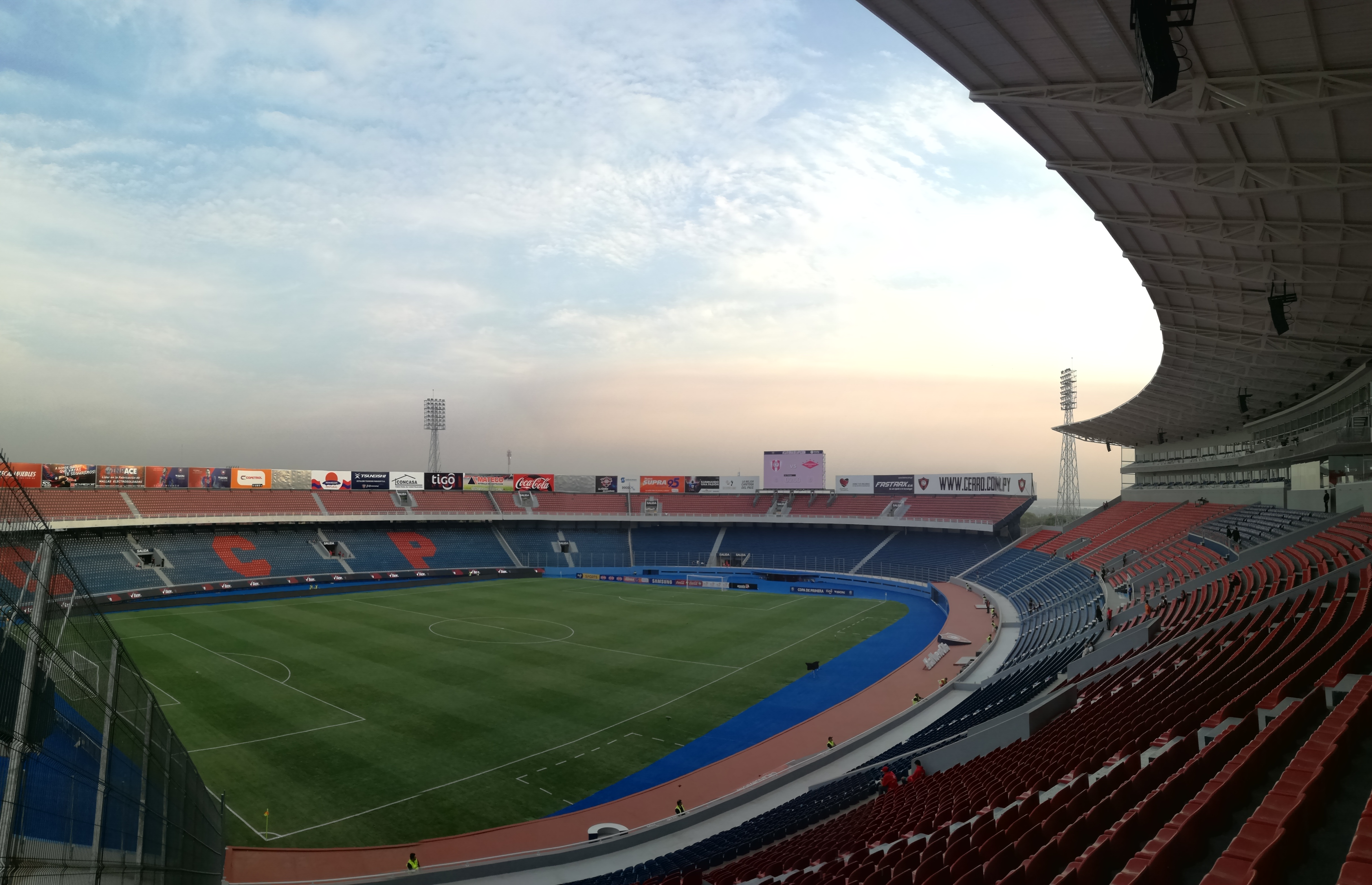 Vista desde preferencia lateral norte de La Nueva Olla